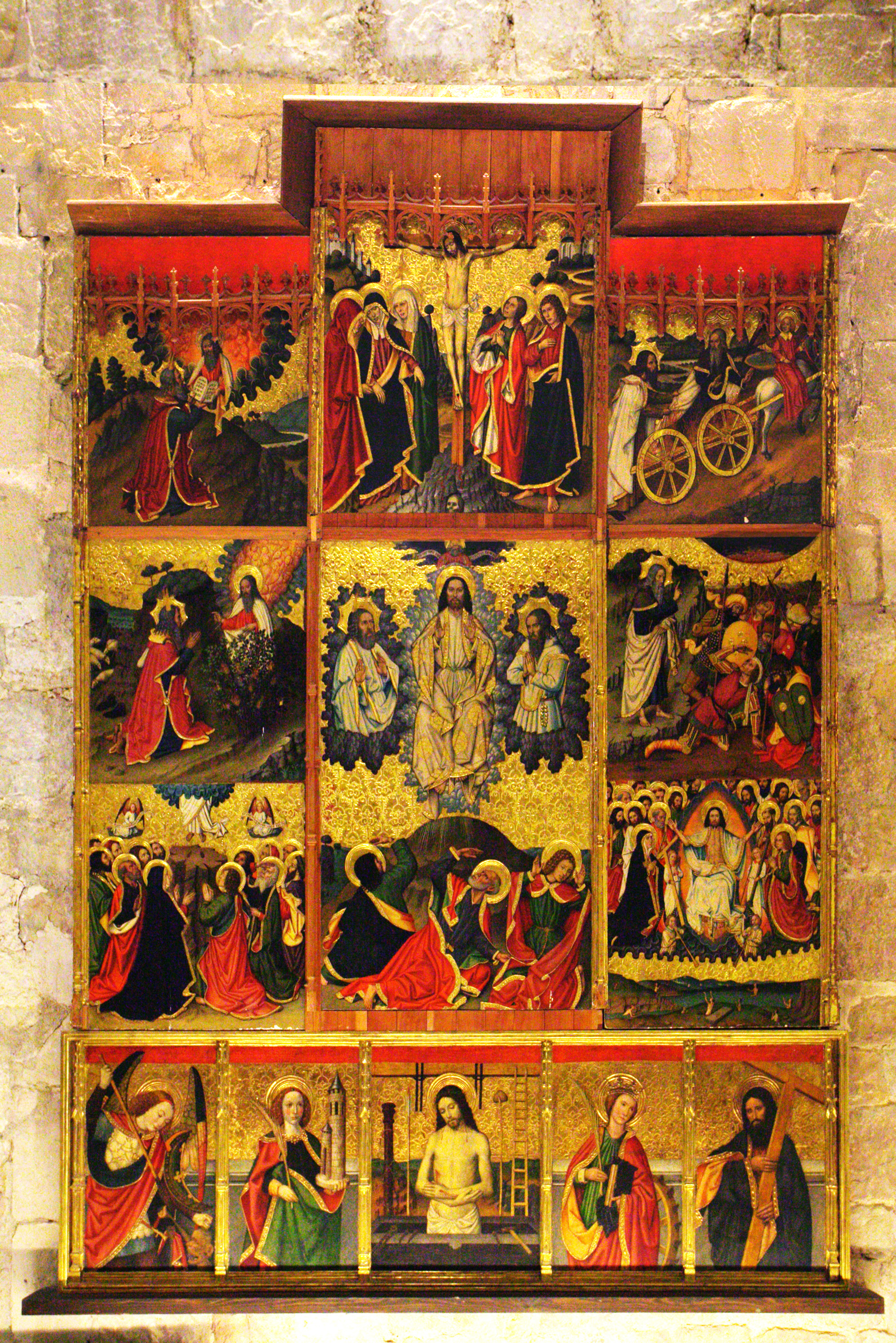 “Retaule de la transfiguració” de Jaume Huguet a la sala de l´antic refectori dels canonges, de la catedral de Tortosa. La seva ubicació original era a la capella central de la girola, darrera l'altar major.